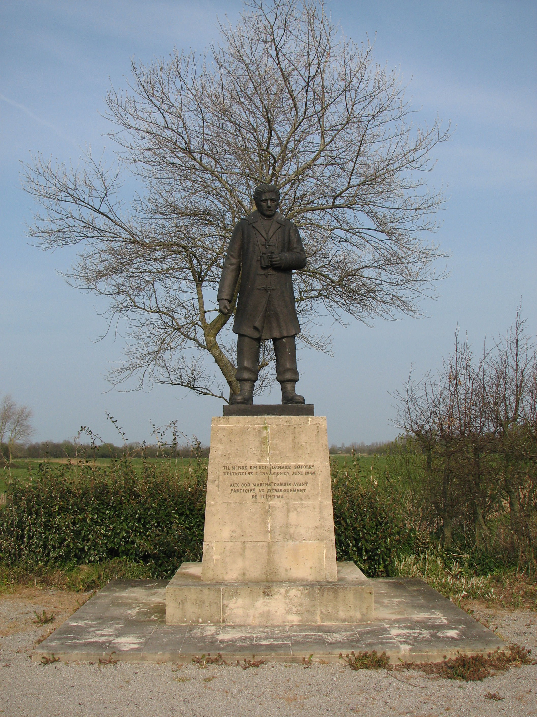 Monument dédié aux marins danois ayant participé au débarquement de Normandie, le 6 juin 1944 Sainte-Marie-du-Mont, route vers Utah Beach, Normandie Monument for Danish seamen involved in the D Day landings in Normandy, June 6th, 1944, Sainte-Marie-du-Mont, on the road for Utah Beach, Normandy